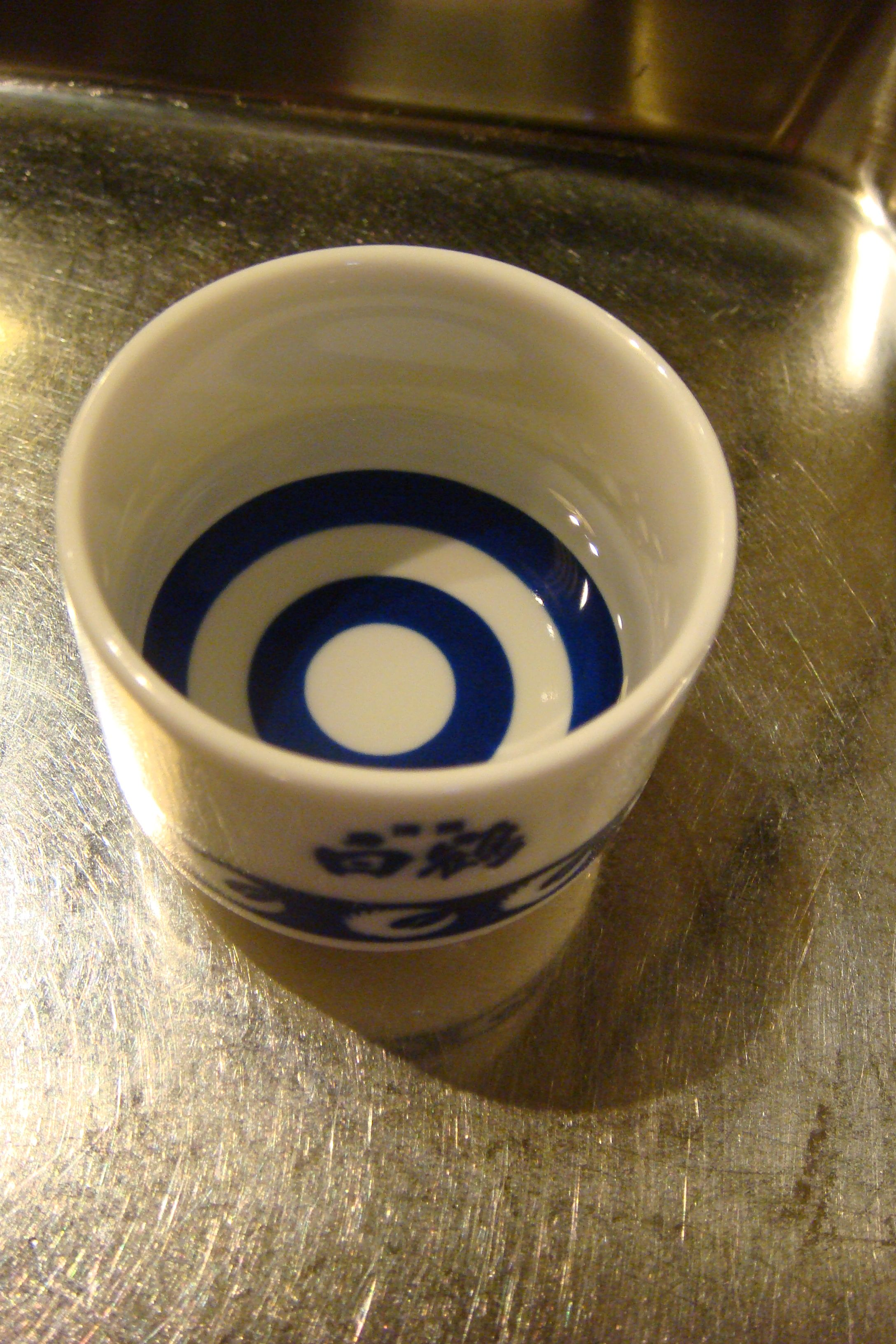 利き酒(試飲)用のお猪口。 写真のためにお酒を注いでもらったけれど、今日は運転手なので眺めるだけです。 ……残念。 (2008/11/21 Kobe, Hyogo, JAPAN)